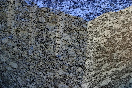 Wildegg: (Holcim) Cresciano-Gneiss (Nr. 03.1-5100)